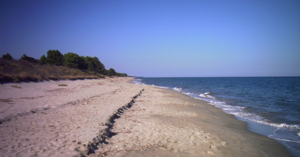 Le bord de mer entre Ghisonaccia et Aleria